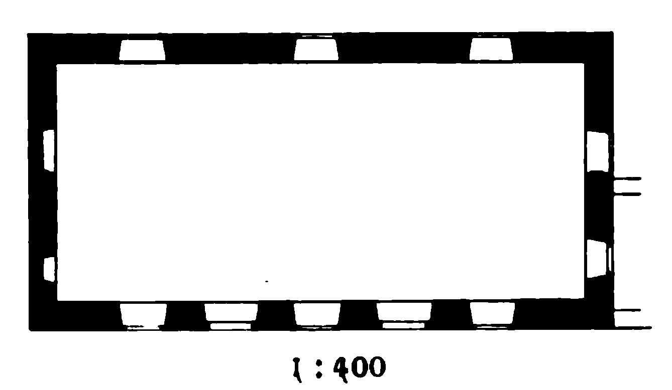 Grundriss der Kapelle in Haldem, Gemeinde Stemwede